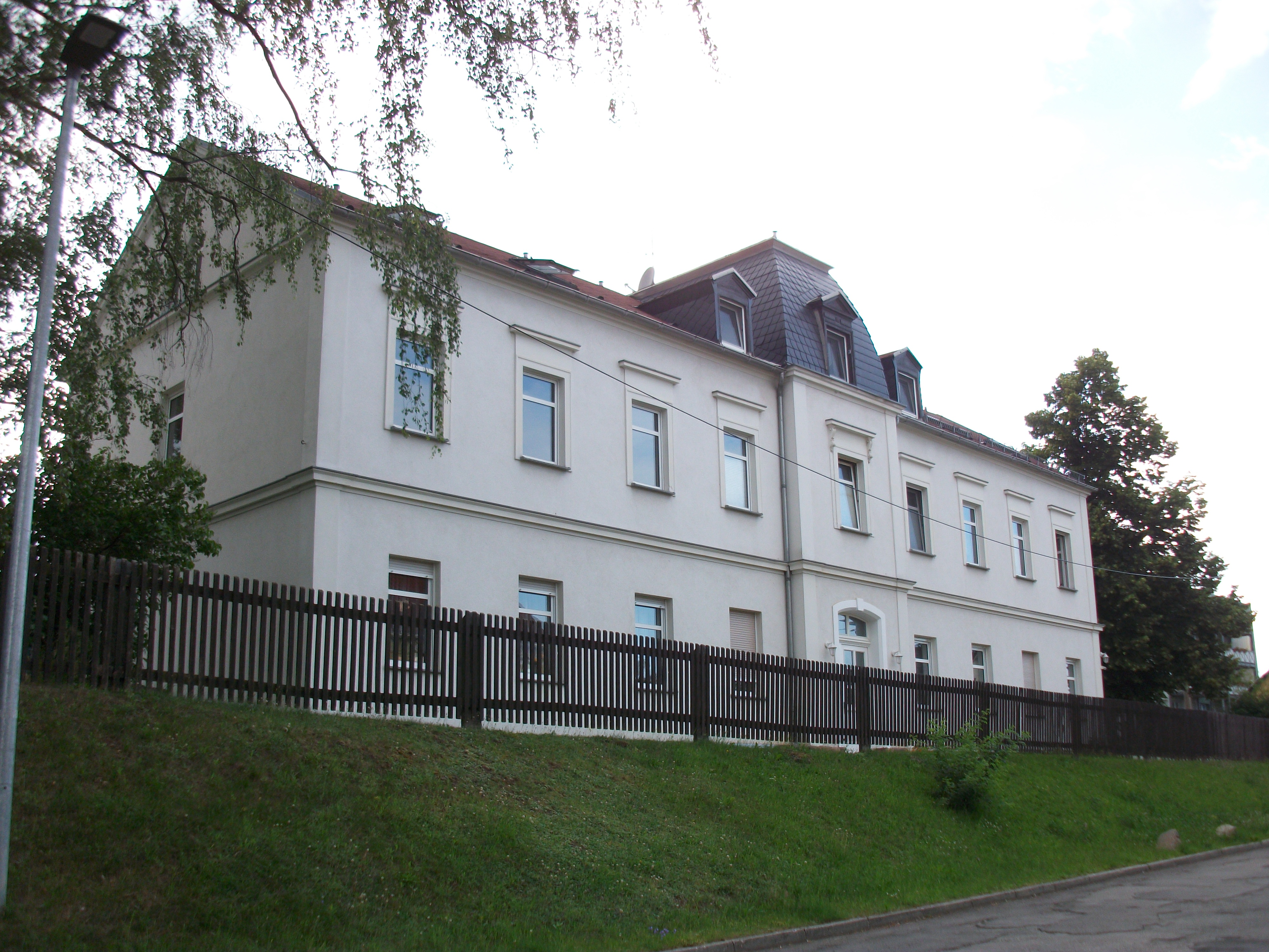 Seiferitzer Schulweg 1, Seiferitz (Ehemalige Schule Seiferitz)